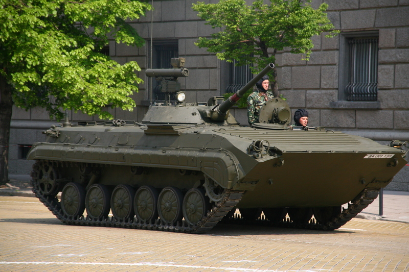 Българска бойна машина БМП-1 по време на парадът за Гергьовден.